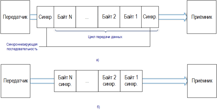 Синхронный способ передачи данных: а) с синхронизирующей последовательностью; б) с применением кодирования с самосинхронизацией